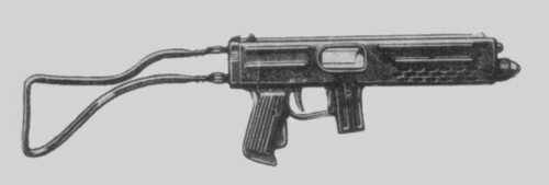 Luigi Franchi LF57 sub machine gun